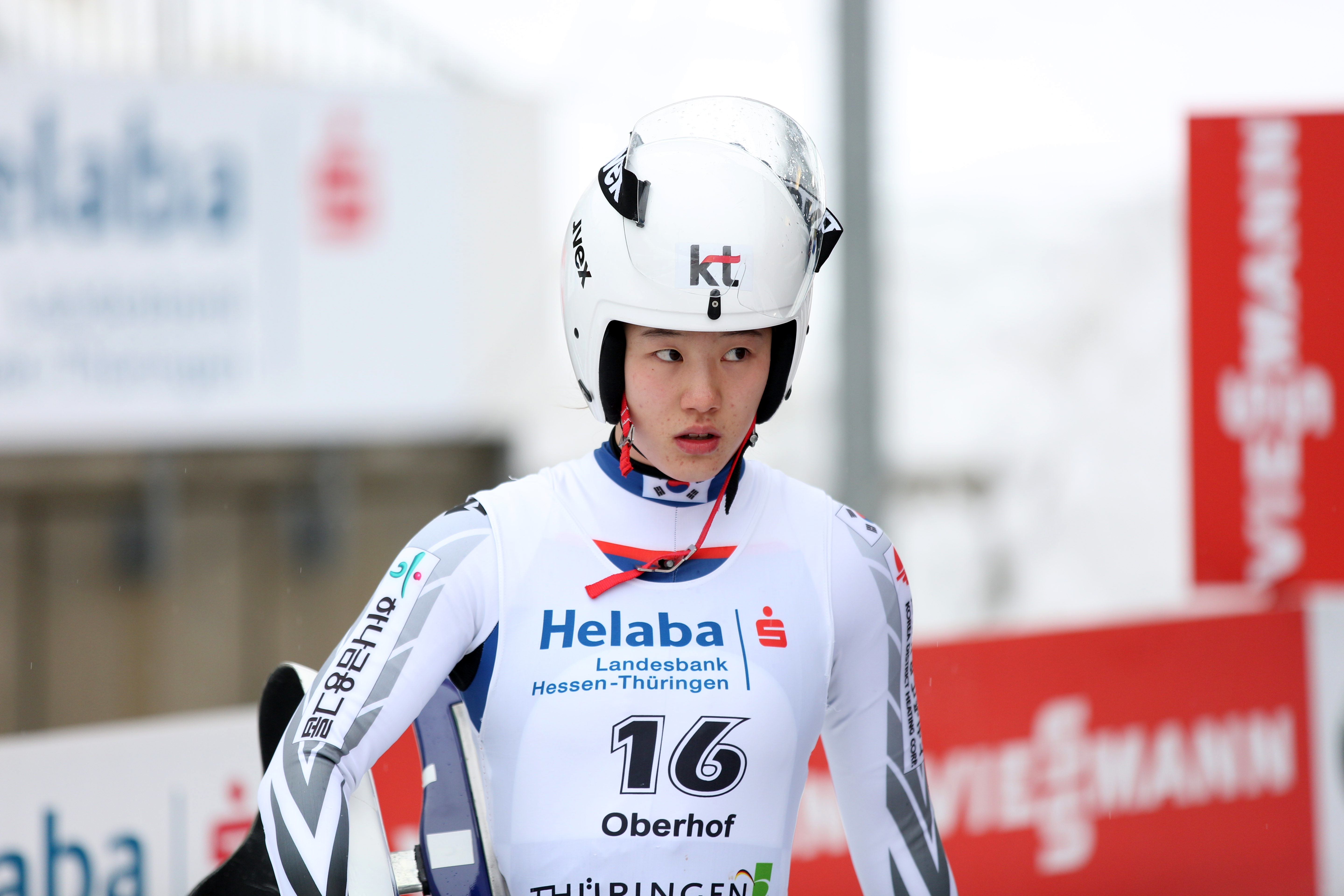 Eunryung Sung beim HELABA Nationscup der Damen in Oberhof 2017